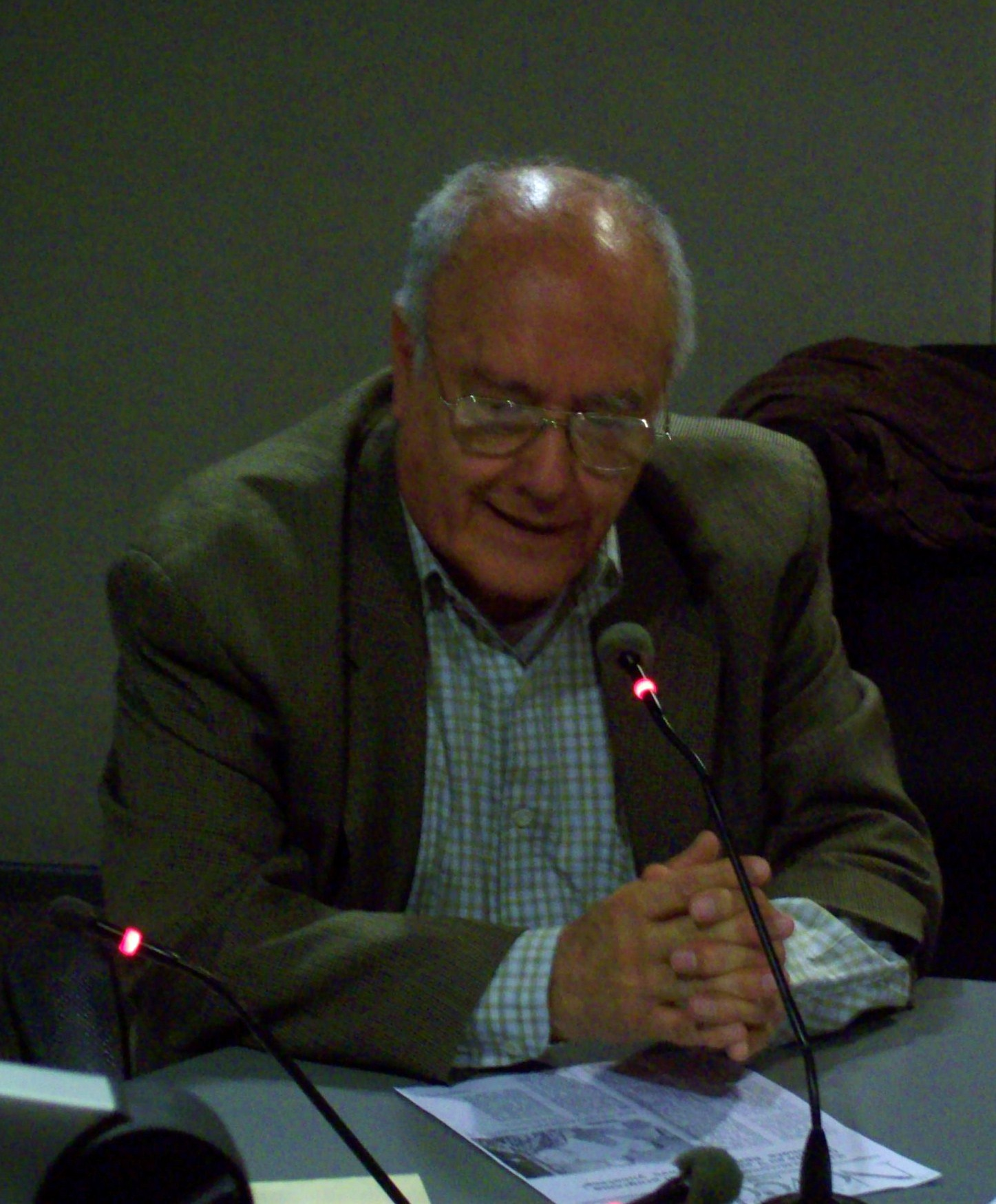 Carlos Fuentes Argüelles habla ante los micrófonos radiofónicos mexicanos.